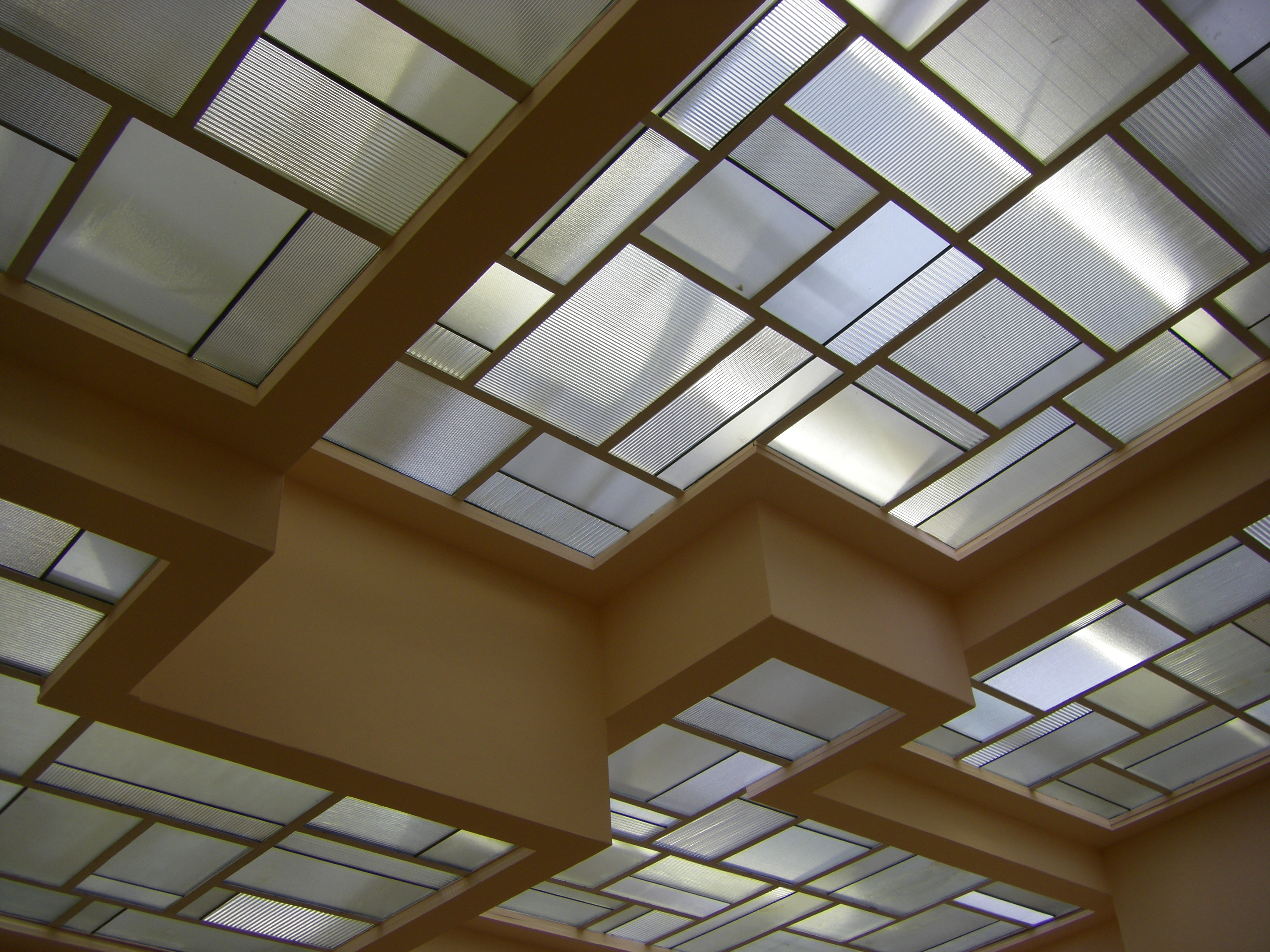 Werk von L.Barillet